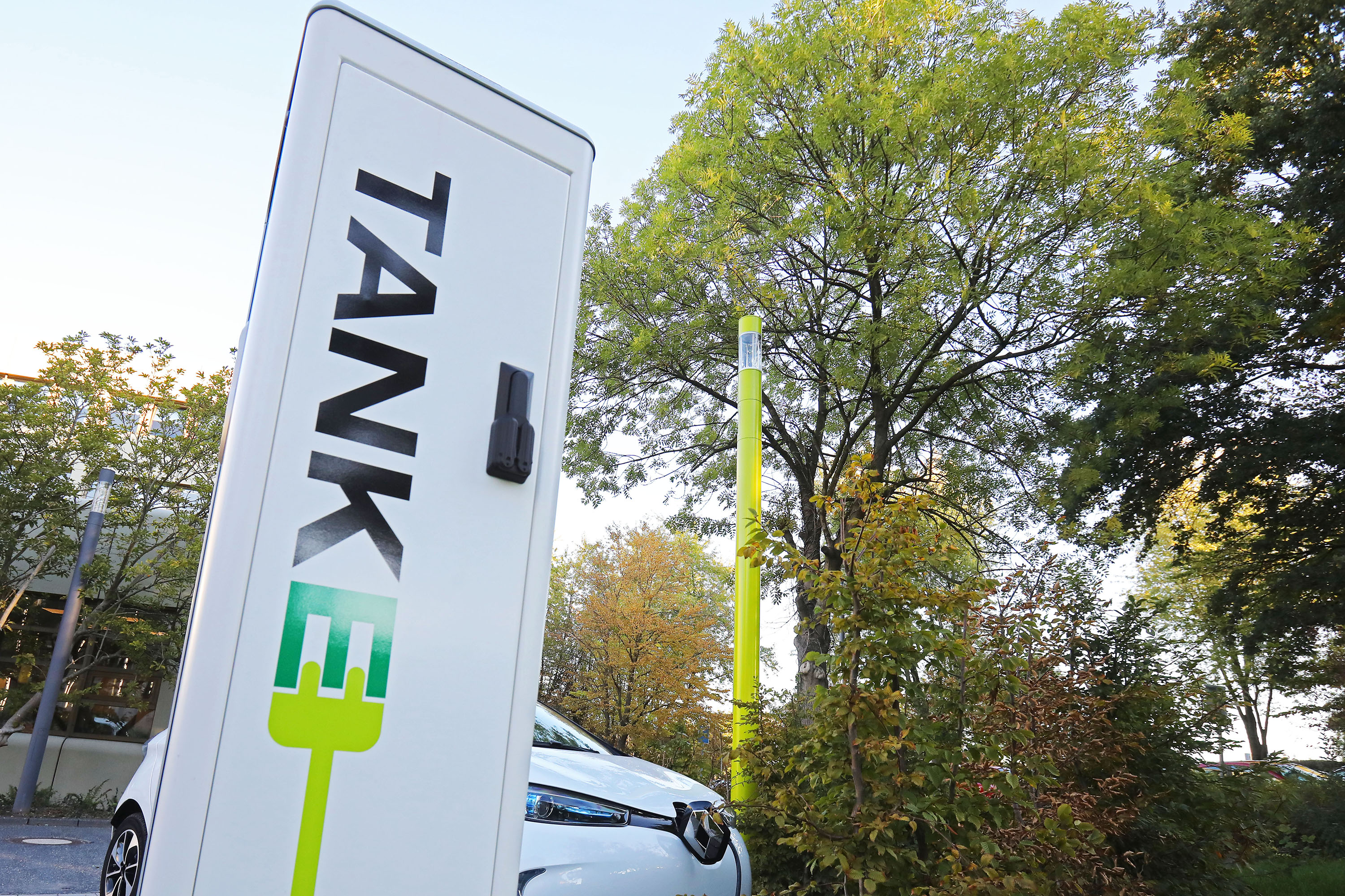 Ladesäule für Elektro-Fahrzeuge der Stadtwerke Solingen, Beethovenstraße